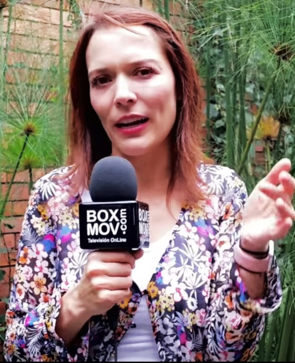 Este 14 de Abril llega a Casa E "Te quiero hasta la luna", una obra romántica protagonizada por Carolina Acevedo y Manuel José Chávez.